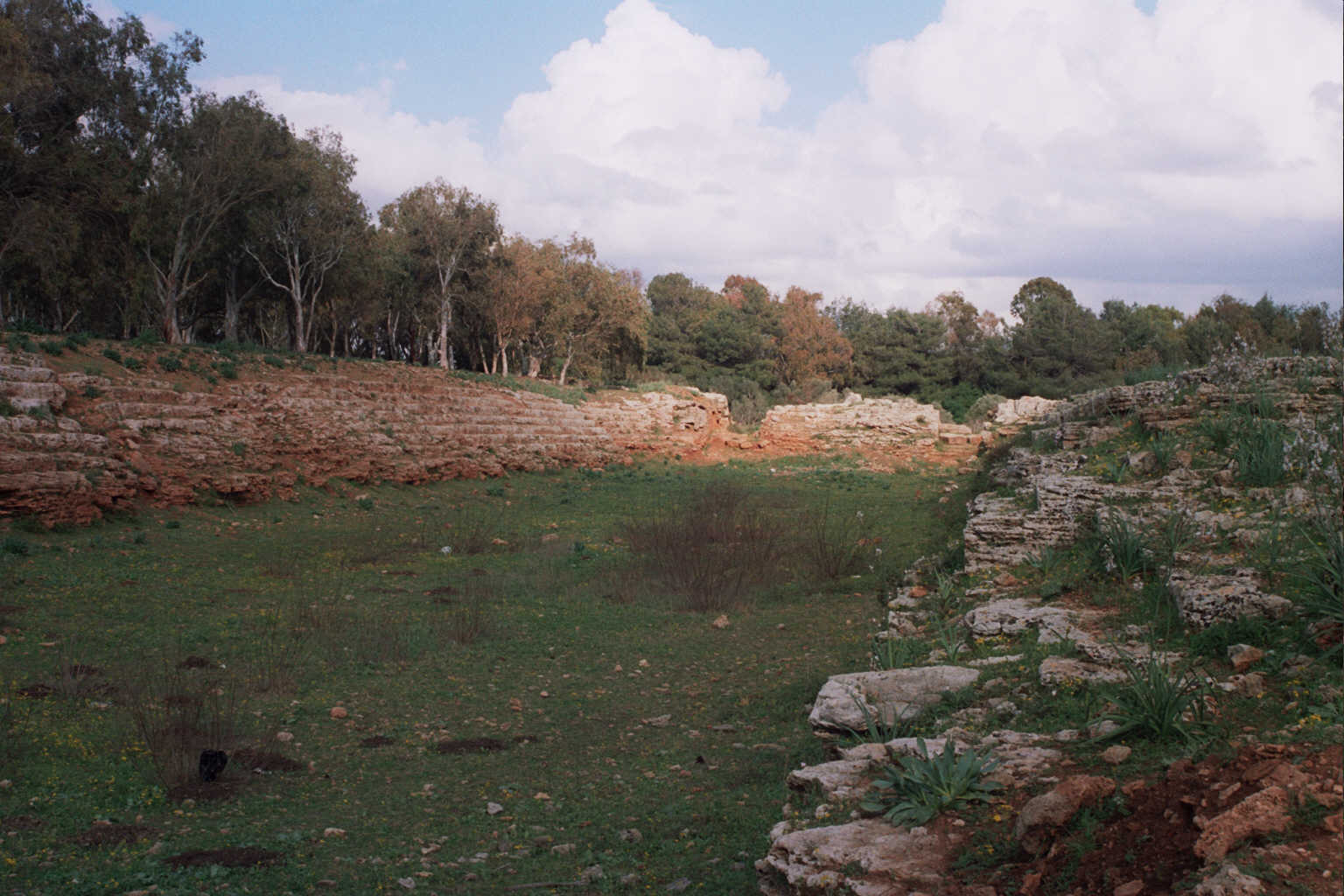 Loris - viaggio Siria - febbraio 2005